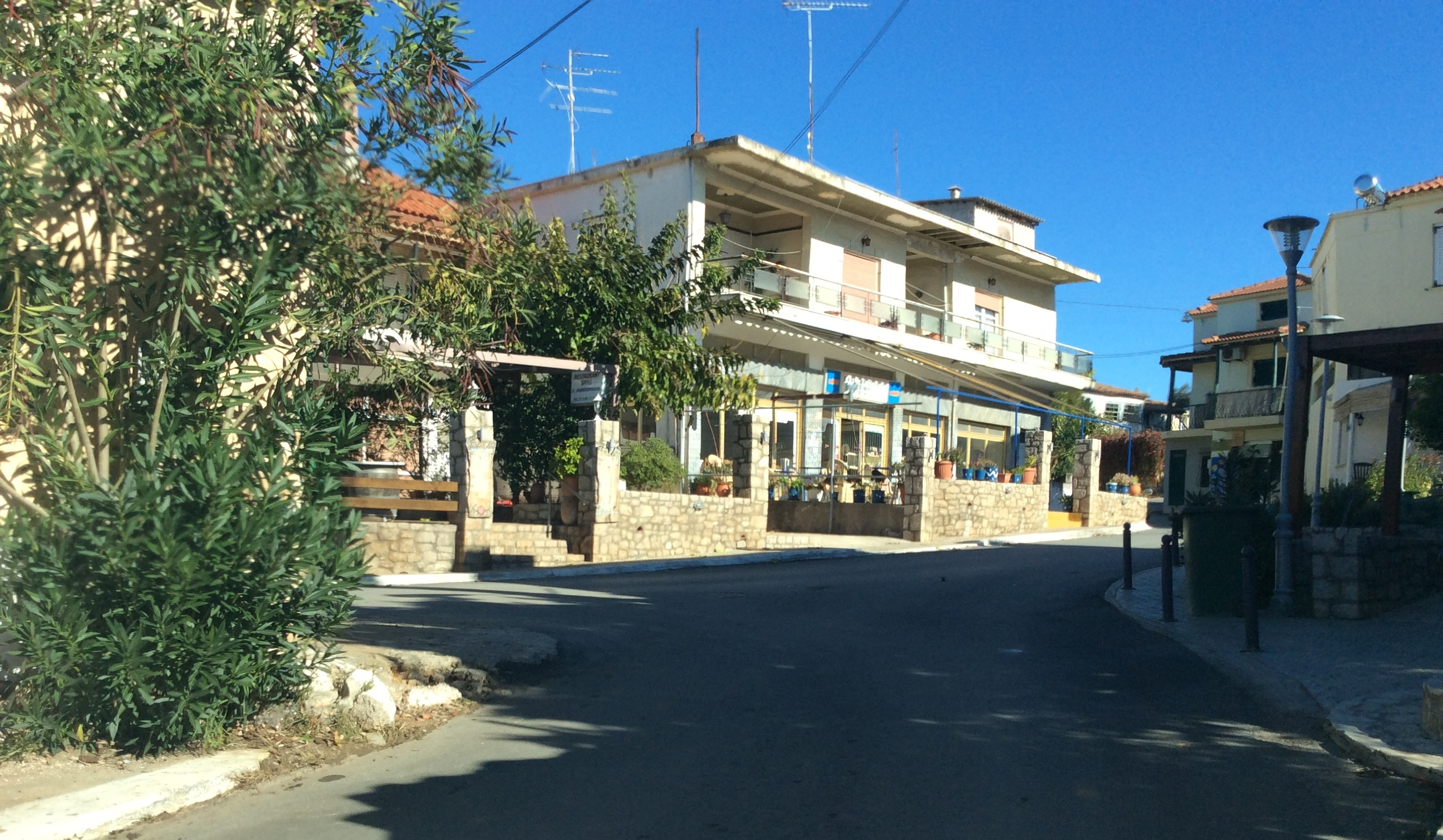 Ρωμανός Μεσσηνίας